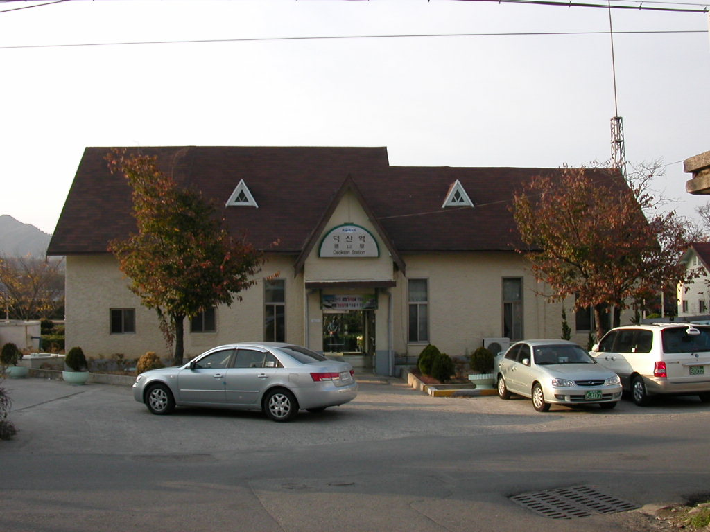 경전선 덕산역